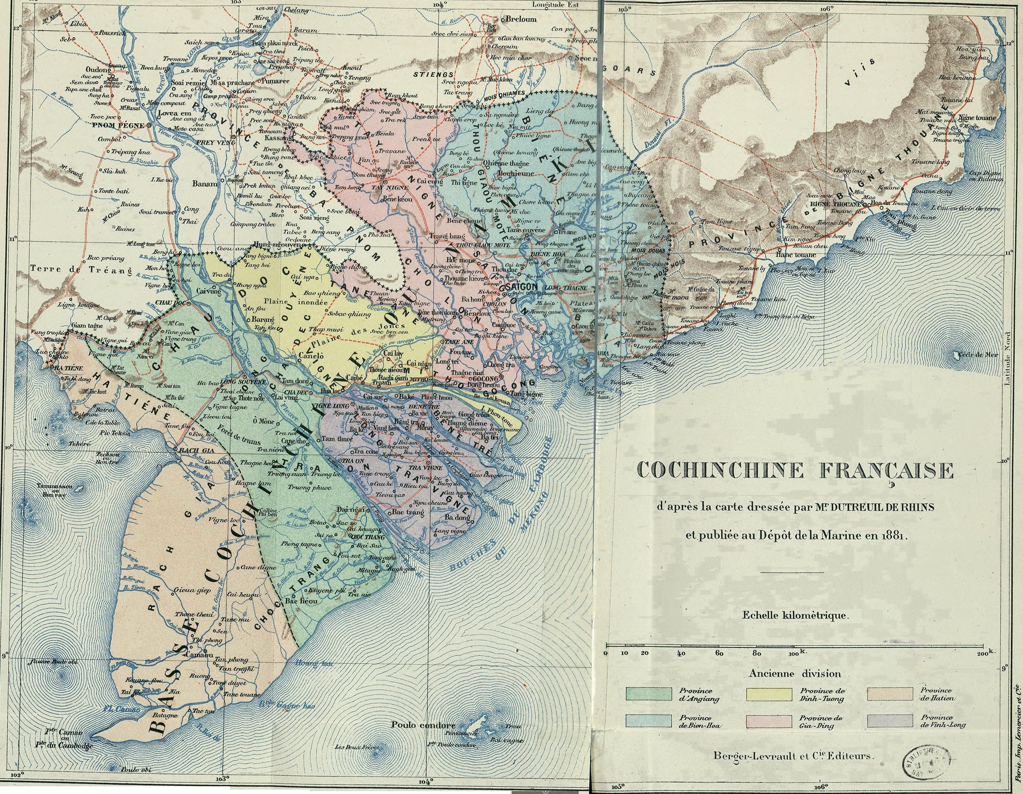 Bản đồ được vẽ bởi ông Dutreuil de Rhins được công bố trong Dépôt de la Marine năm 1881. Nam Kỳ thuộc Pháp (Basse Cochinchine Francaise) khoảng năm 1881, nhưng vẽ theo hành chính của Nam Kỳ Lục Tỉnh nhà Nguyễn (Basse CochinChine) trước năm 1861.